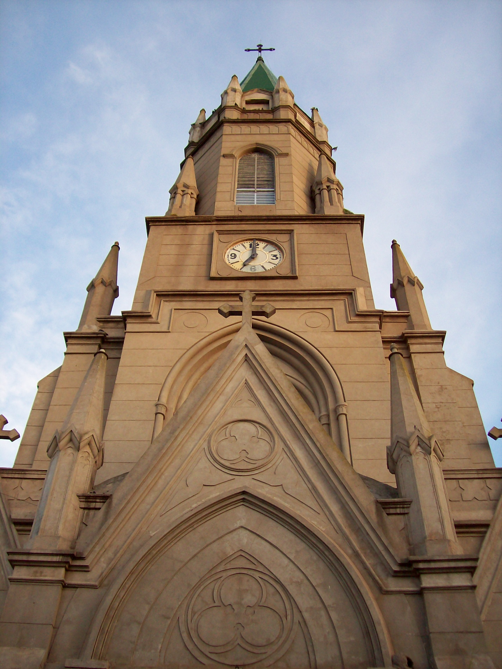 Outside San Francisco Javier Parish in Ramallo, Buenos Aires Province